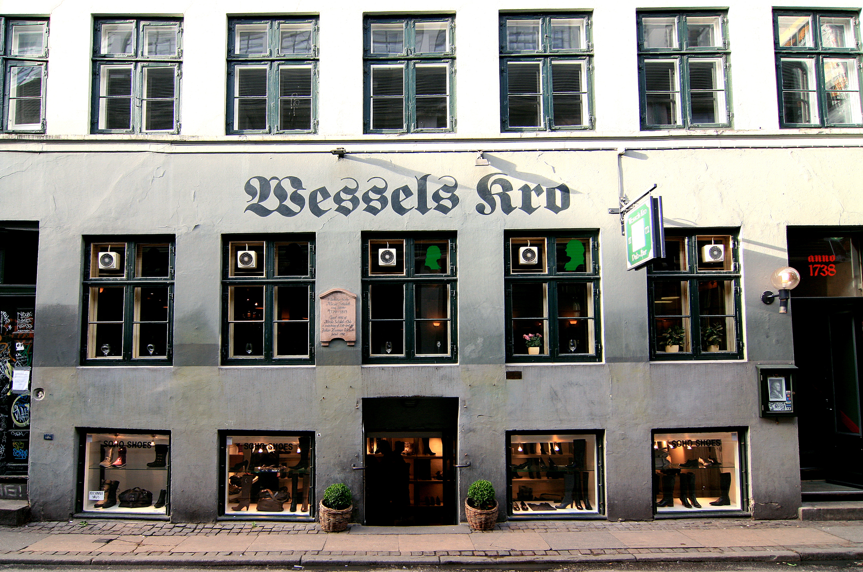 I dette hus i Sværtegade 7 i København havde Det Norske Selskab sine lokaler 1772-1813.